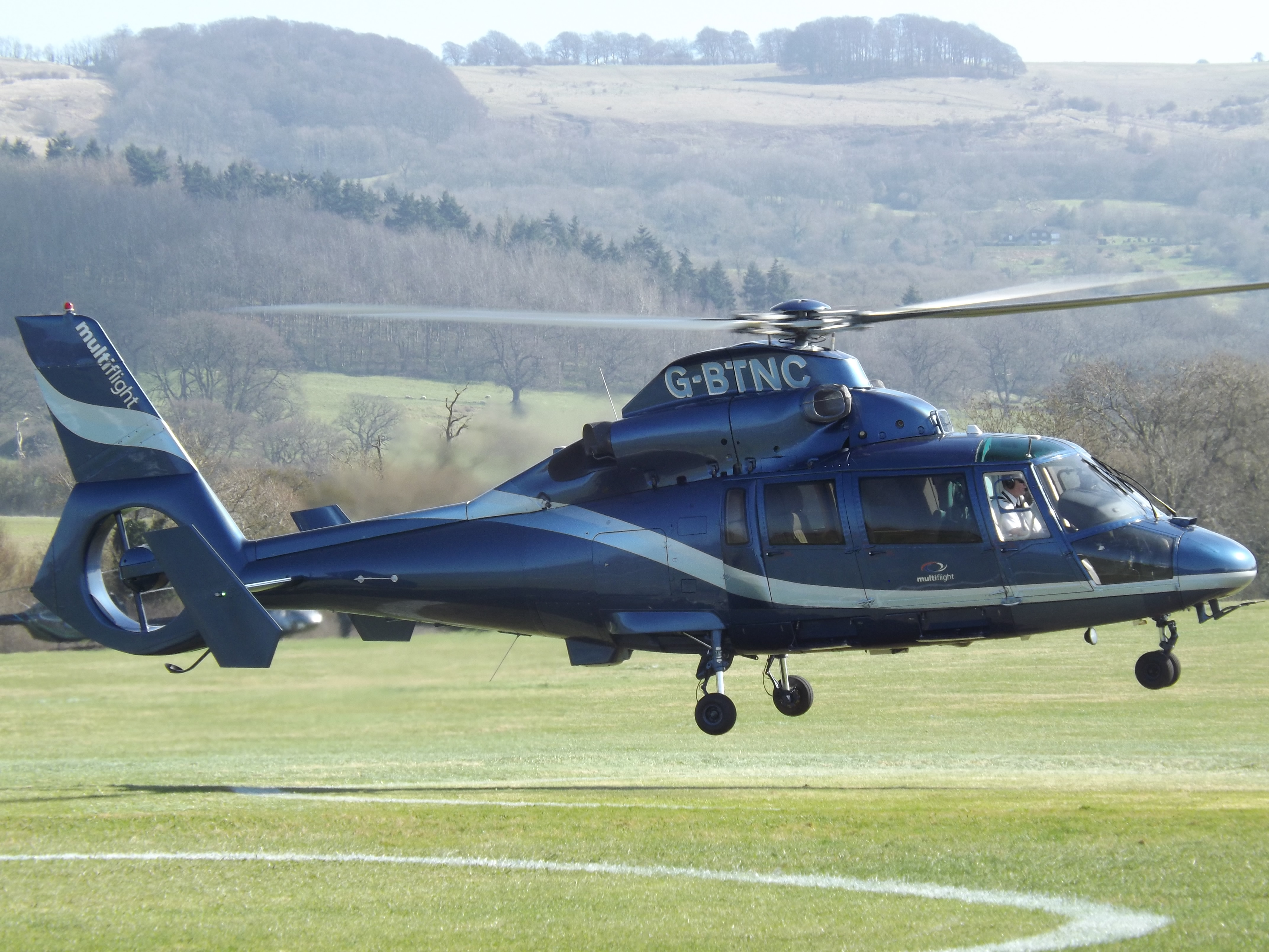 At Cheltenham Helipad.